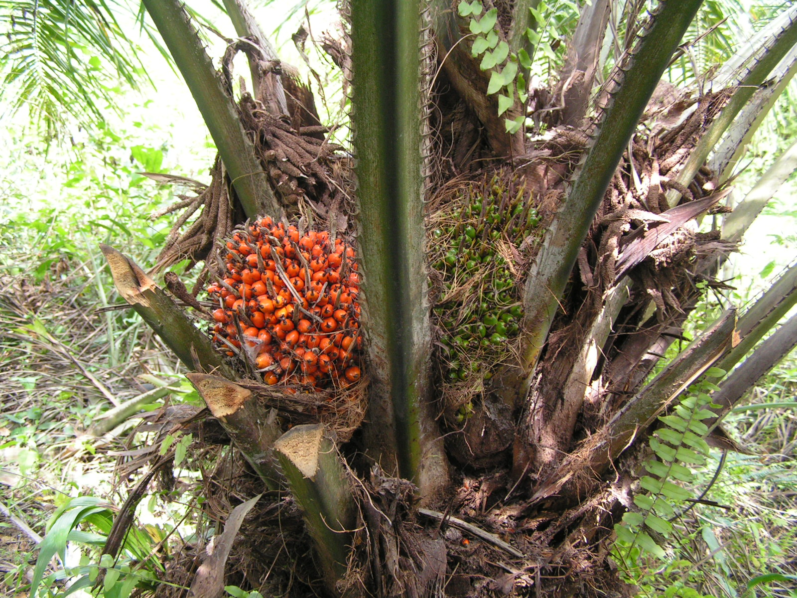 Elaeis guineensis fruits on tree, ripe and 2 weeks before ripe. Taken at my farm in Ajumaku, Ghana.